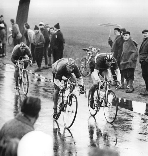 Klaus Ampler, Kurt Müller, Lothar Appler Zentralbild Gahlbeck Ma-AT 28.3.1965 Berlin: Saisoneröffnung der Straßenfahrer mit Friedensfahrkandidaten. Wenige Meter vor dem Ziel in Ahrensfelde überspurtet Kurt Müller (Mitte) den Friedensfahrtkandidaten Lothar Appler (rechts, beide SC Dynamo Berlin) und erkämpfte sich den Sieg in 1:59:40 st. Hintergrund linkd Klaus Ampler (3. Platz, SC Dirk Leipzig) . Information: Auf der verkürzten Strecke von Ahrensfelde nach Feienwalde und zurück (86 km) fand am 28.3.1965 das diesjährige Eröffnungsrennen der Straßenfahrer statt.